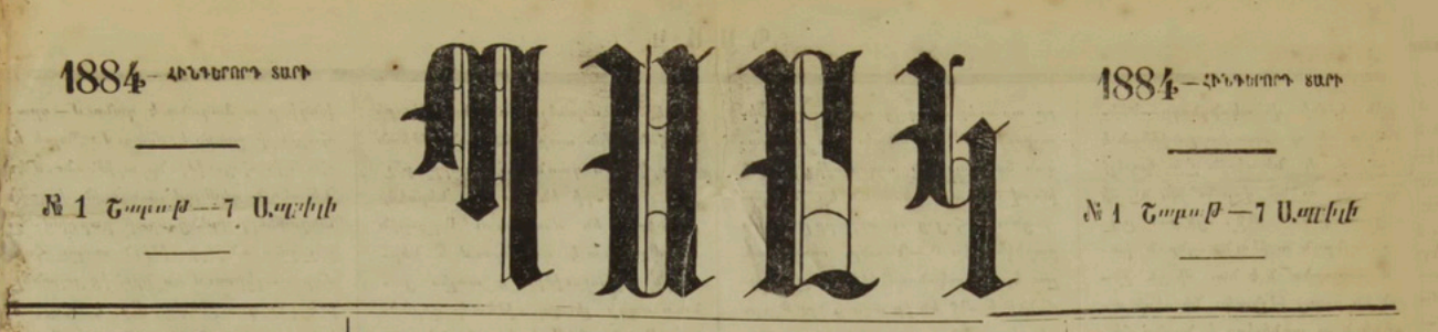 «Պսակ» թերթի առաջին էջը 1884 թ. ապրիլի 7-ի համարից